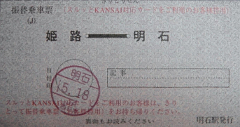 JR明石駅 振替乗車票 -のスルッとKANSAI用控えの半券 加工済